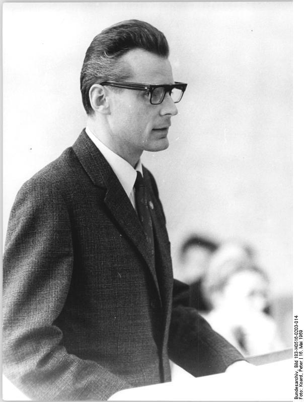 Zentralbild Koard-16.5.1969 Berlin: Bedeutsame 17. Sitzung des Staatsrates der DDR im Amtssitz am Marx-Engels-Platz. Hans-Heinrich Simon, Komplementär und Mitglied des Staatsrates, unterstrich in seinem Diskussionsbeitrag, daß auch die Bündnispartner der Arbeiterklasse ihr Wissen den Anforderungen der wissenschaftlich-technischen Revolution entsprechend ständig erweitern müssen.